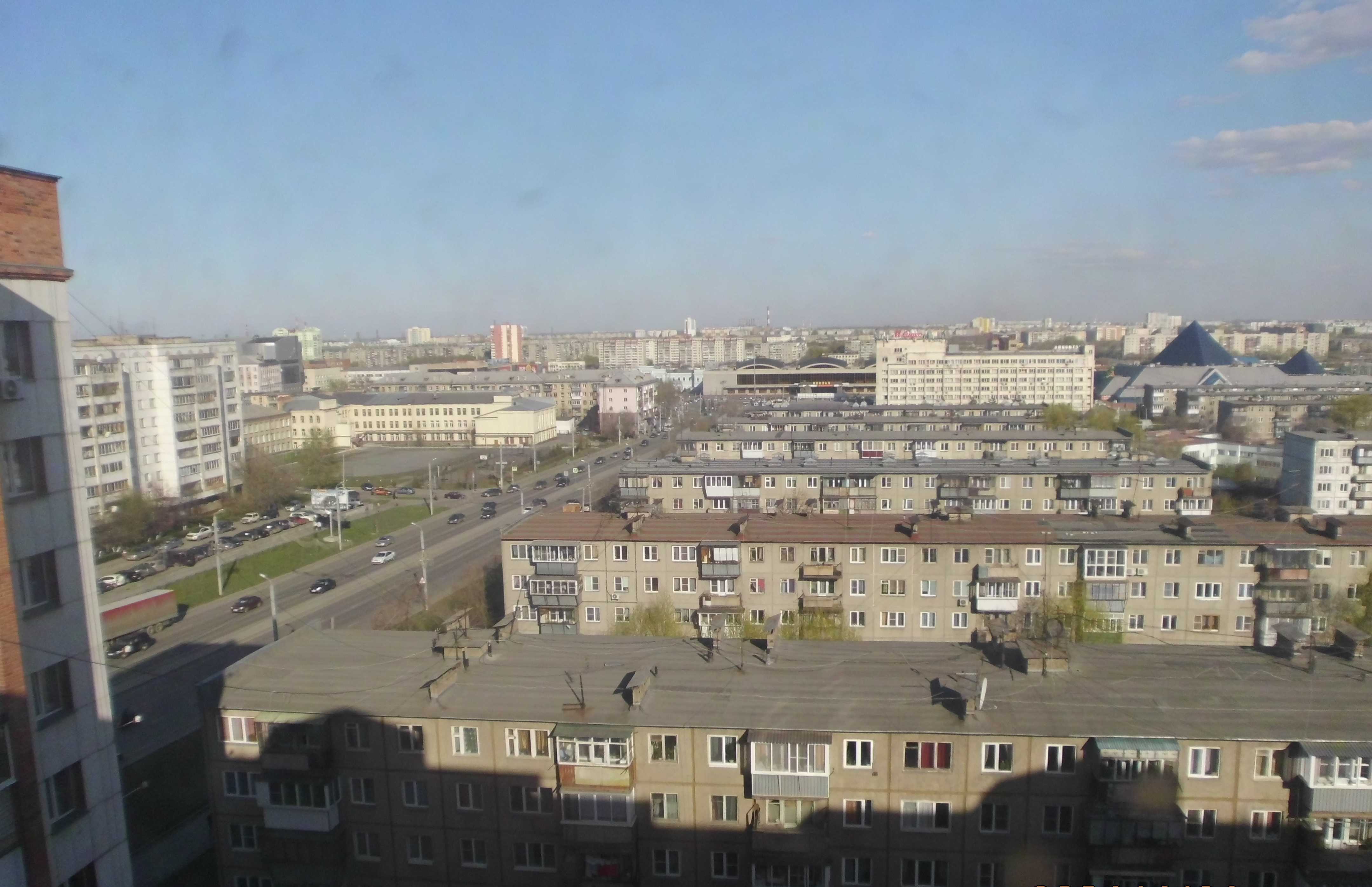 Россия, г. Челябинск